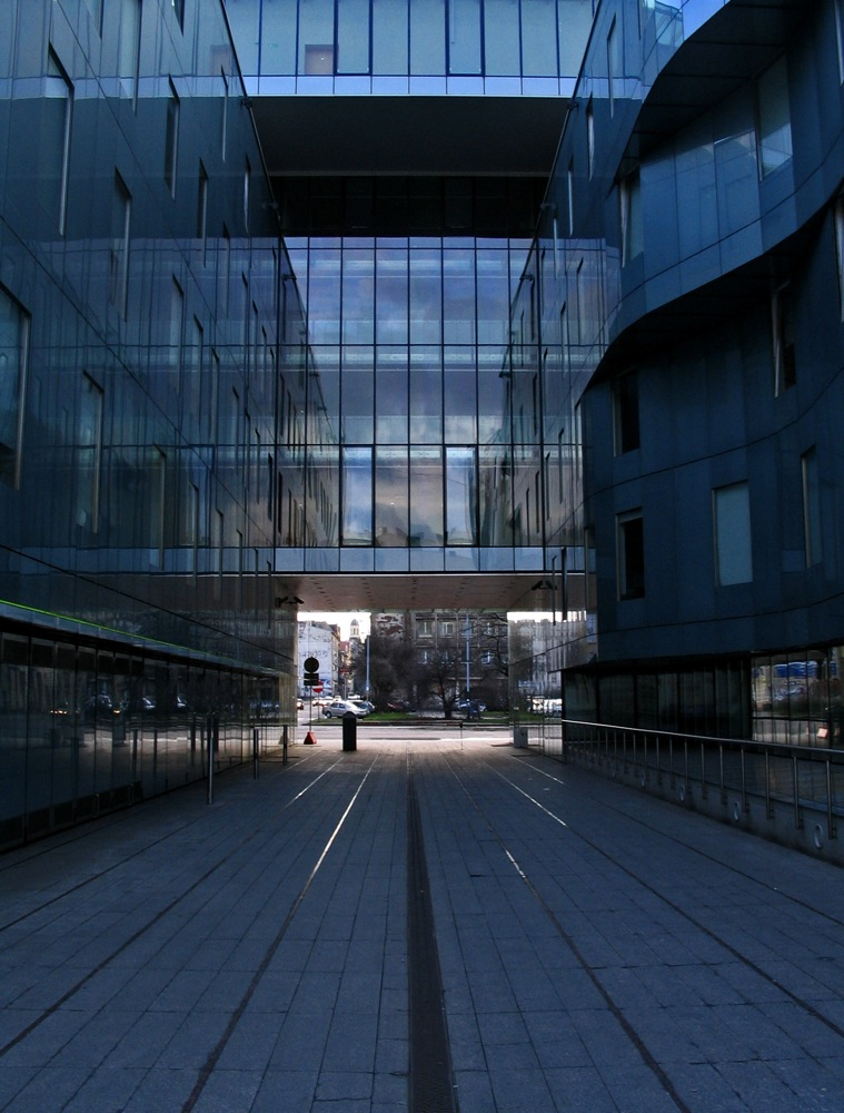 Dziedziniec Filharmonii Łódzkiej w Łodzi